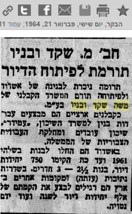 חברת משה שקד ובניו תורמת לפיתוח הדיור